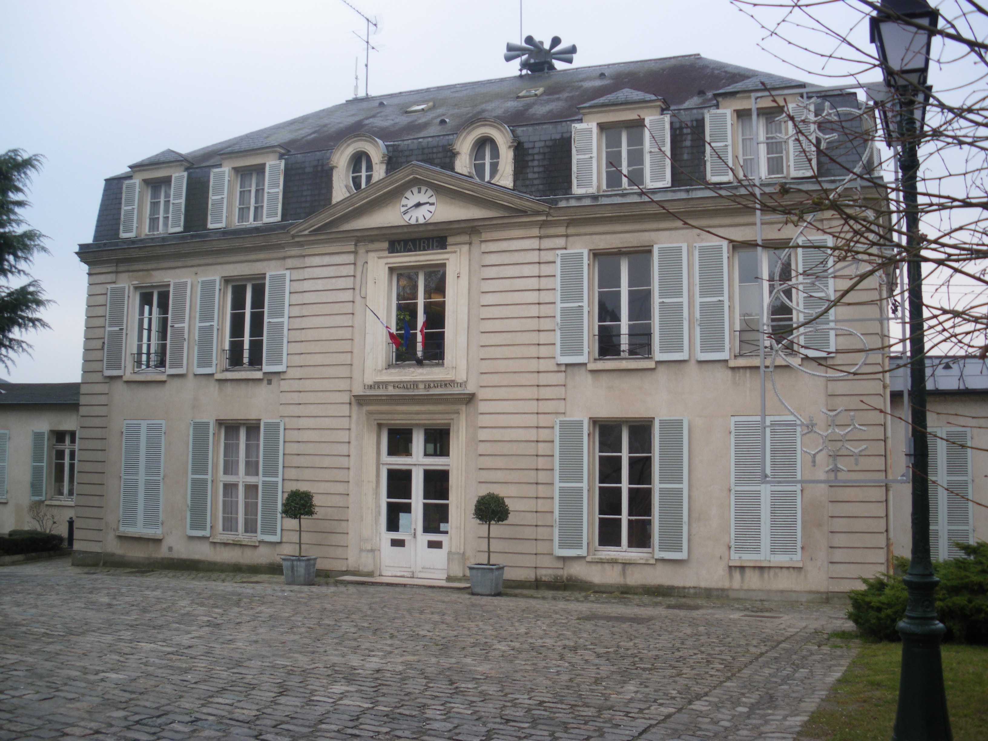 Mairie de Bièvres, Essonnes, France